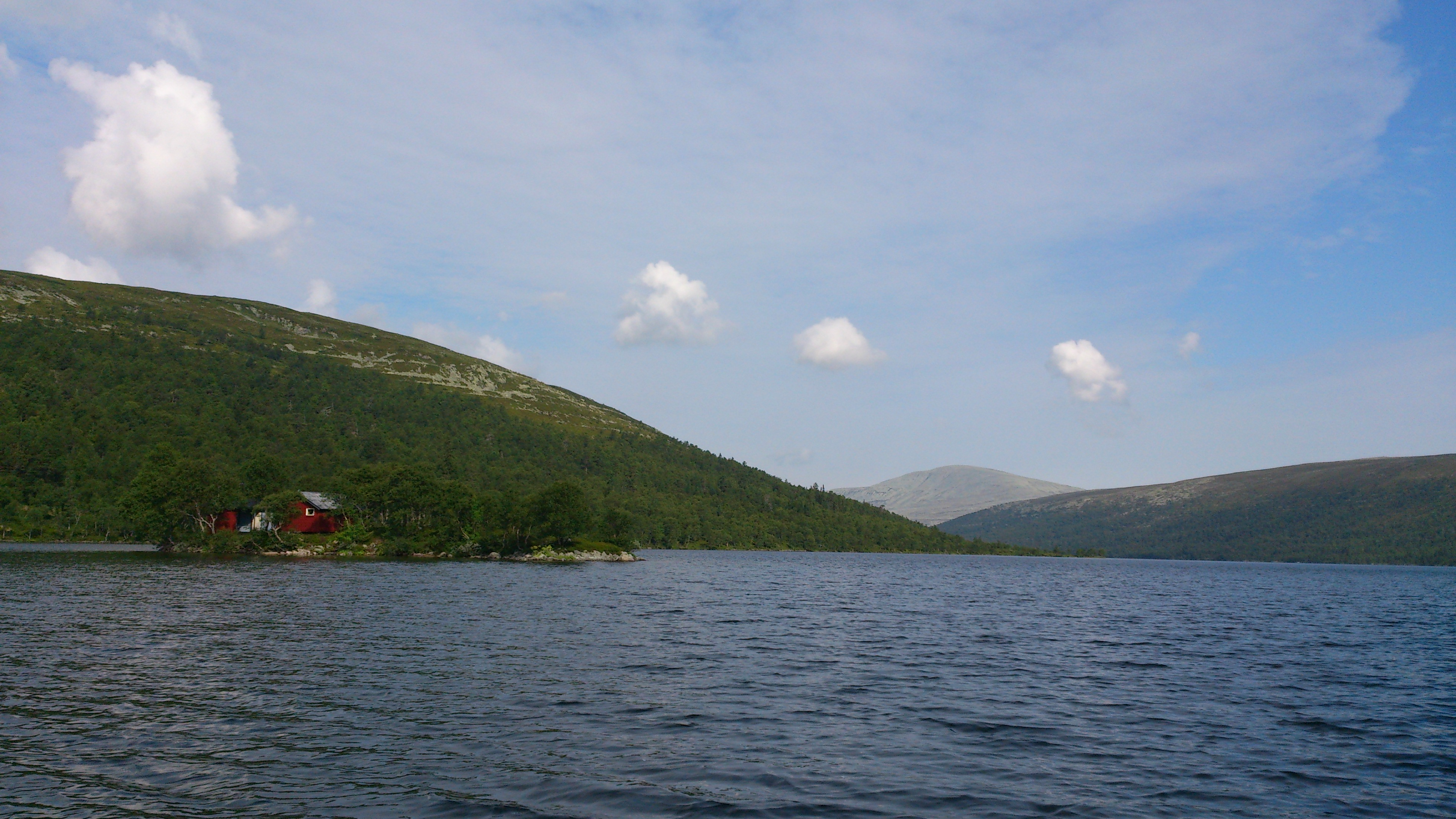 Grövelsjön